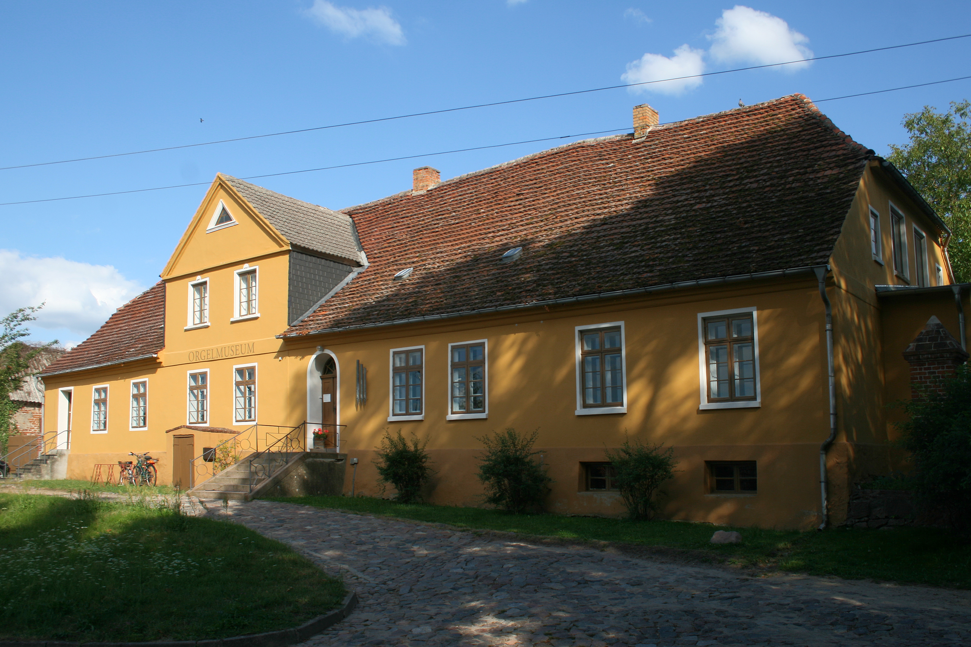 ehemaliges Pfarrhaus in Malchow (Mecklenburg-Vorpommern), heute Orgelmuseum